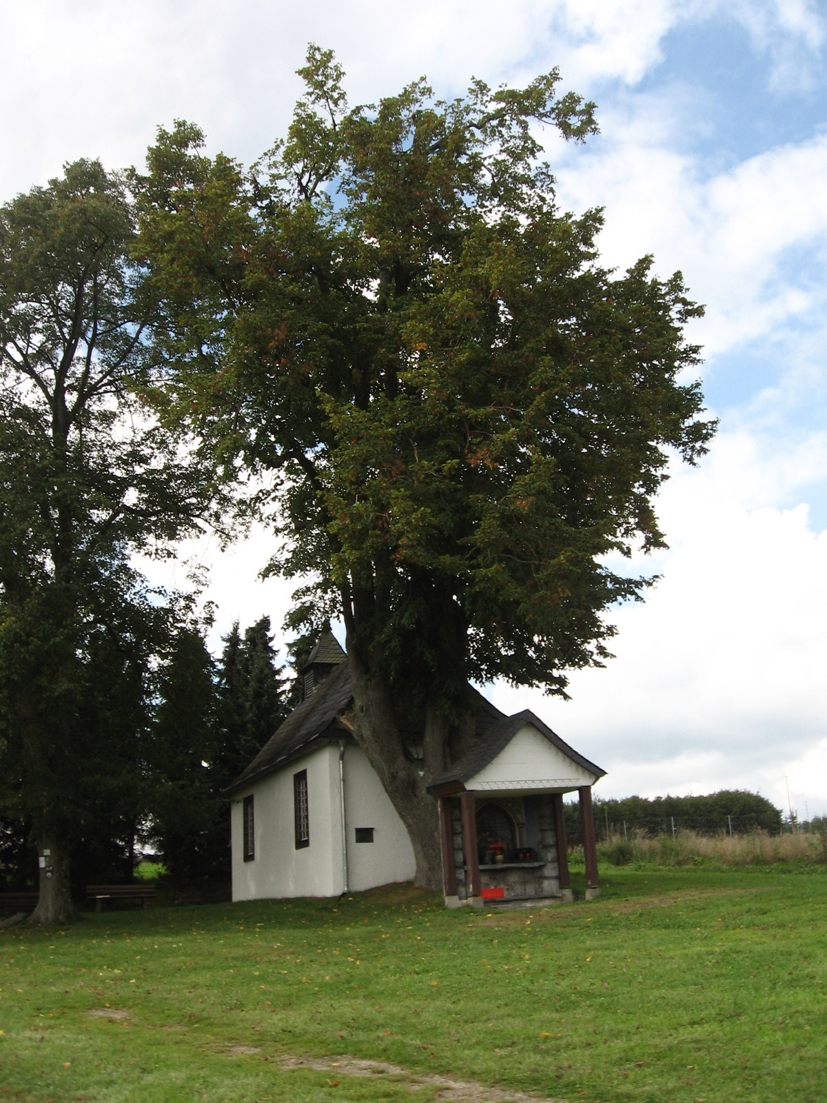 Naturdenkmal Linde (Nr 2.2.24 im Landschaftsplan Meschede) neben der Halloh-Kapelle nördlich von Meschede-wallen